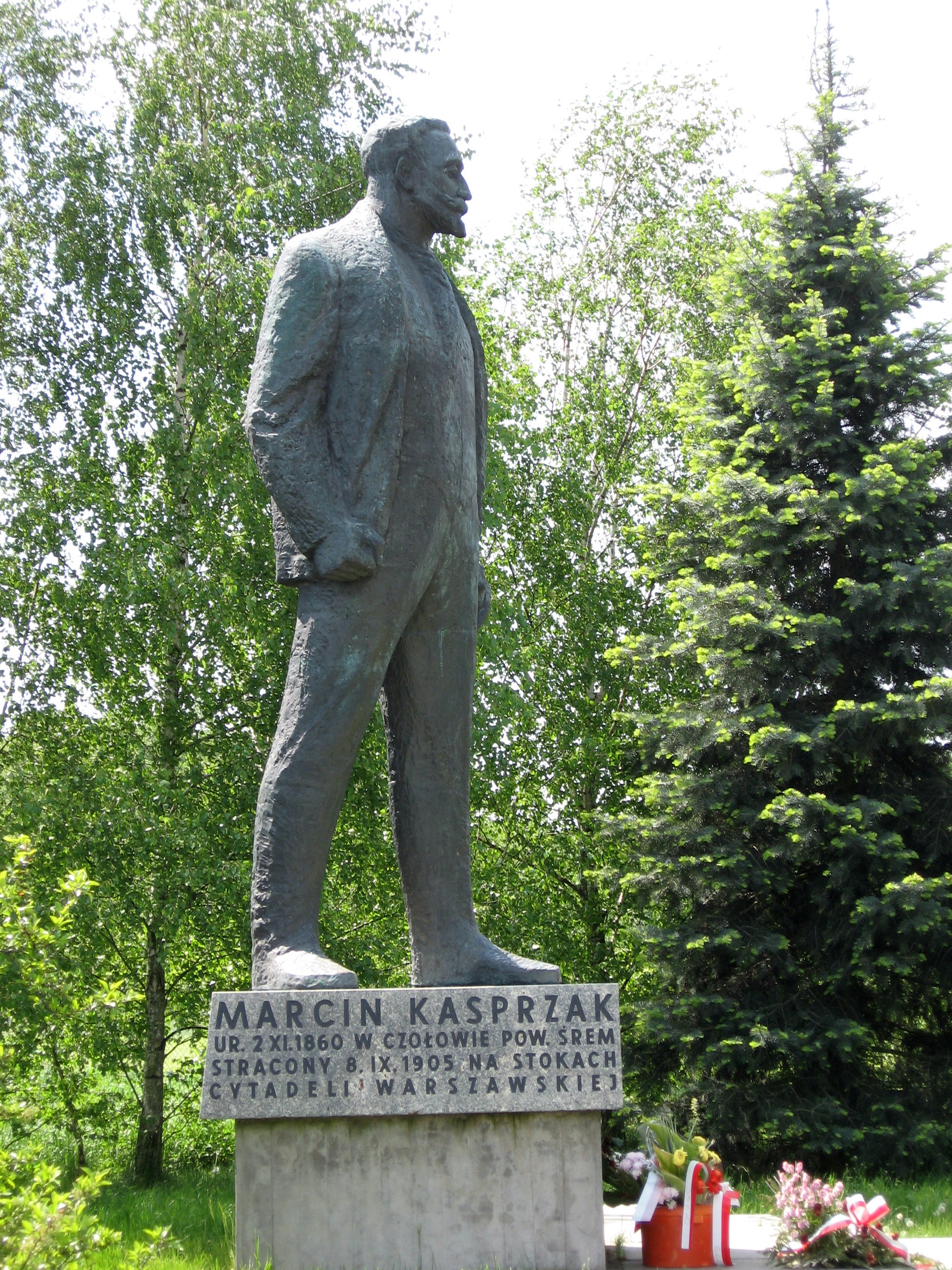 Pomnik Marcina Kasprzaka we wsi Czołowo. Pomnik autorstwa Anny Krzymańskiej i Ryszarda Skupina odsłonięto 20 VII 1963 roku w parku przy ulicy Głogowskiej w Poznaniu. W roku 1989 pomnik został rozebrany i trafił do magazynu. Dzięki staraniom organizacji lewicowych, w roku 1995 pomnik przeniesiono do wsi Czołowo niedaleko Kórnika, gdzie w roku 1860 urodził się Marcin Kasprzak.